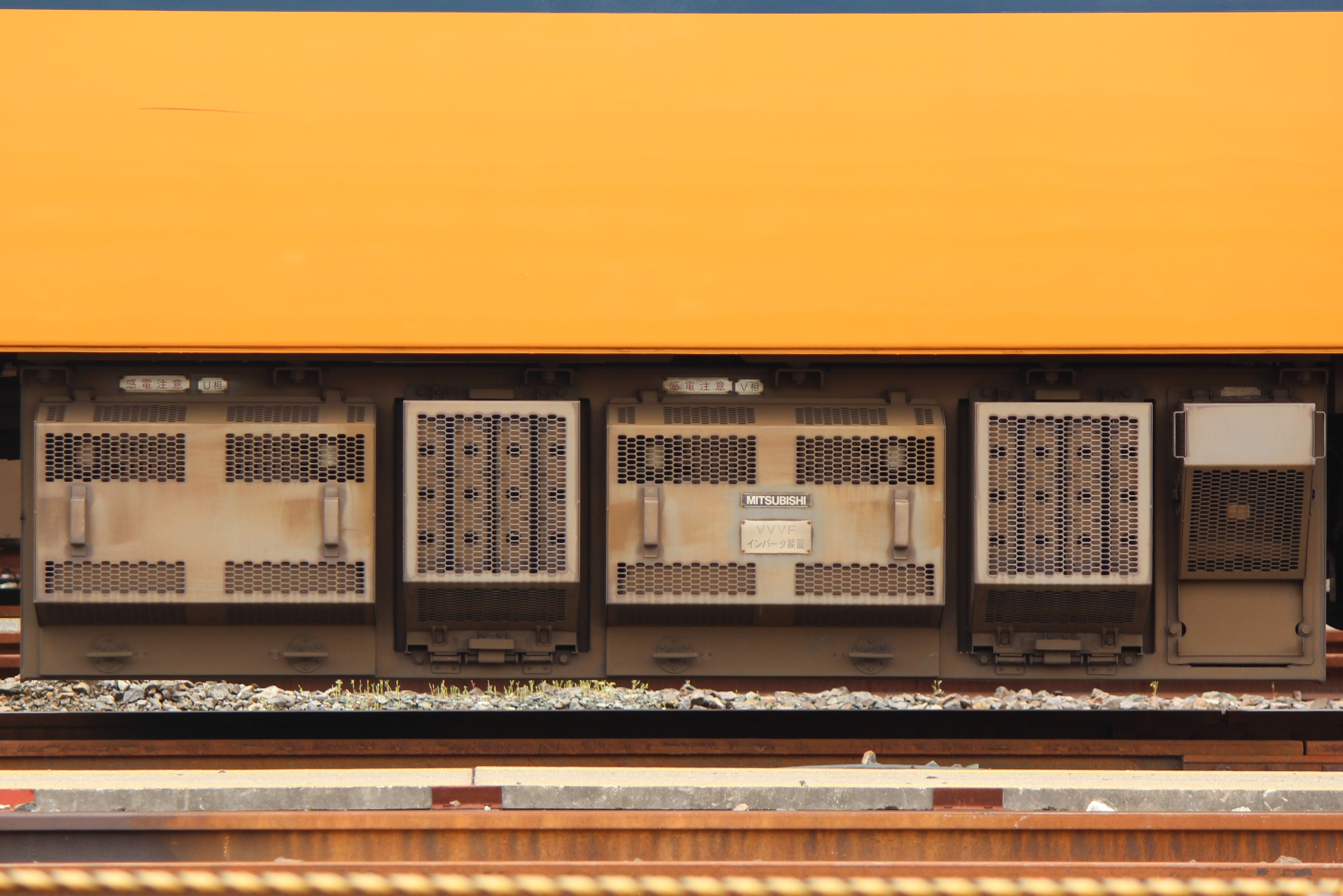 近鉄22000系 VVVFインバータ装置